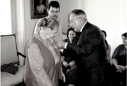 Gina Magnavita Stella